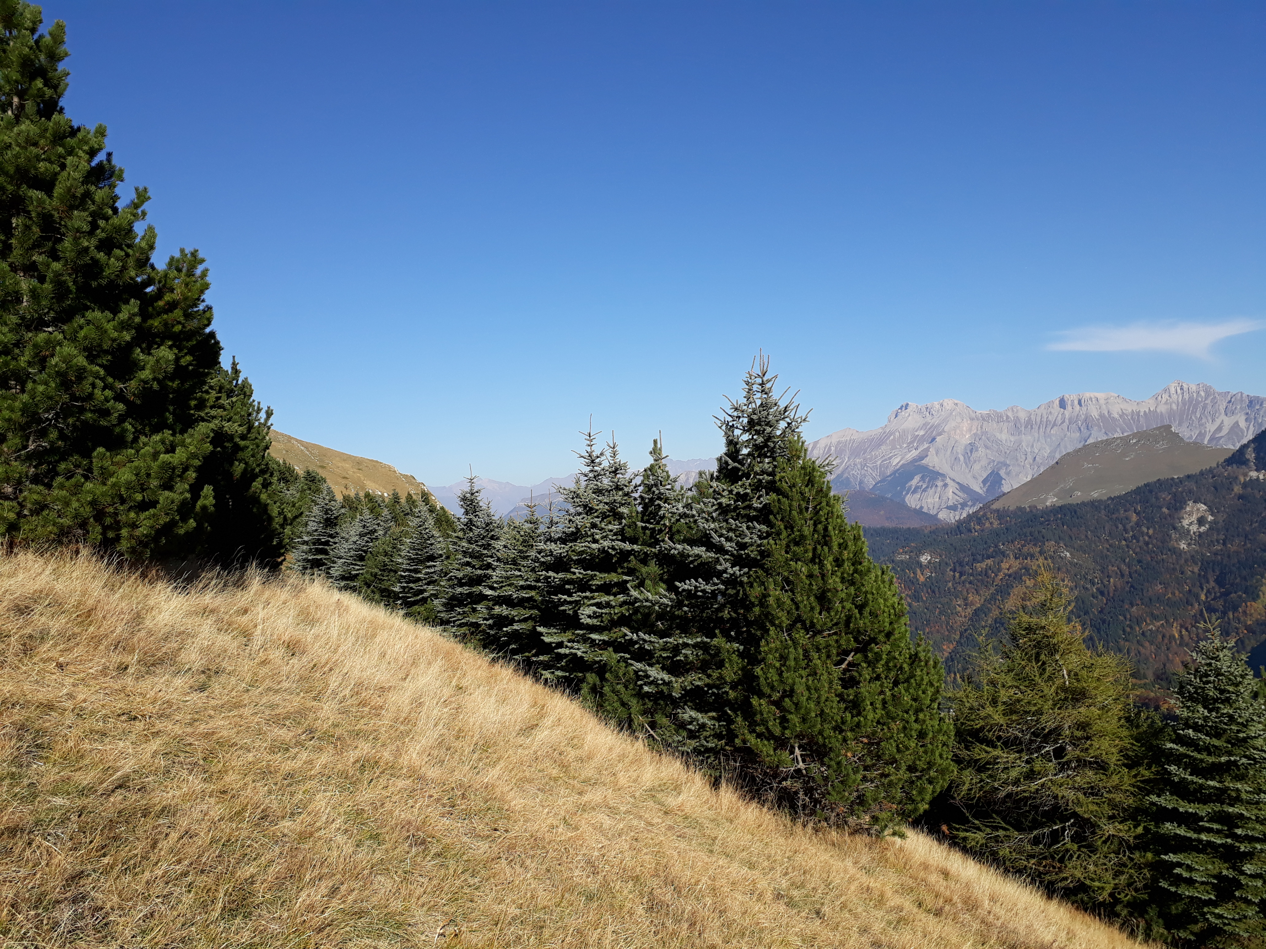 Plantations de résineux (épicéas, sapins, pins) anti avalanche, réalisées par l'ONF au moment de la construction de la station de ski du Jocou, au début des années 1970, sur le versant sud est de la crête de l'Archat (commune de Lalley, Isère), entre les altitudes 1750 Et 1850 m. Les plantations sont réalisées parallèlement aux courbes de niveau.